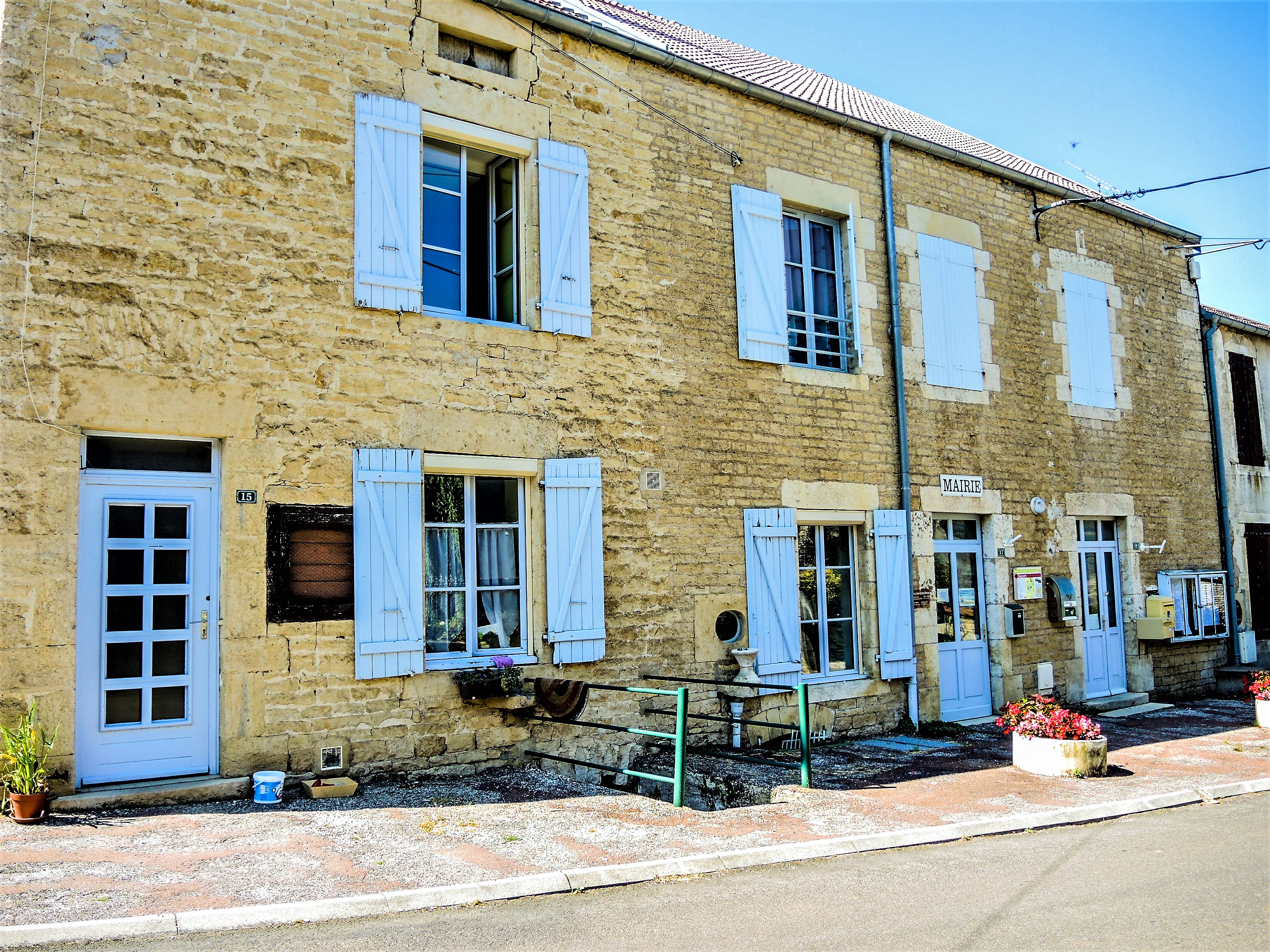 Mairie